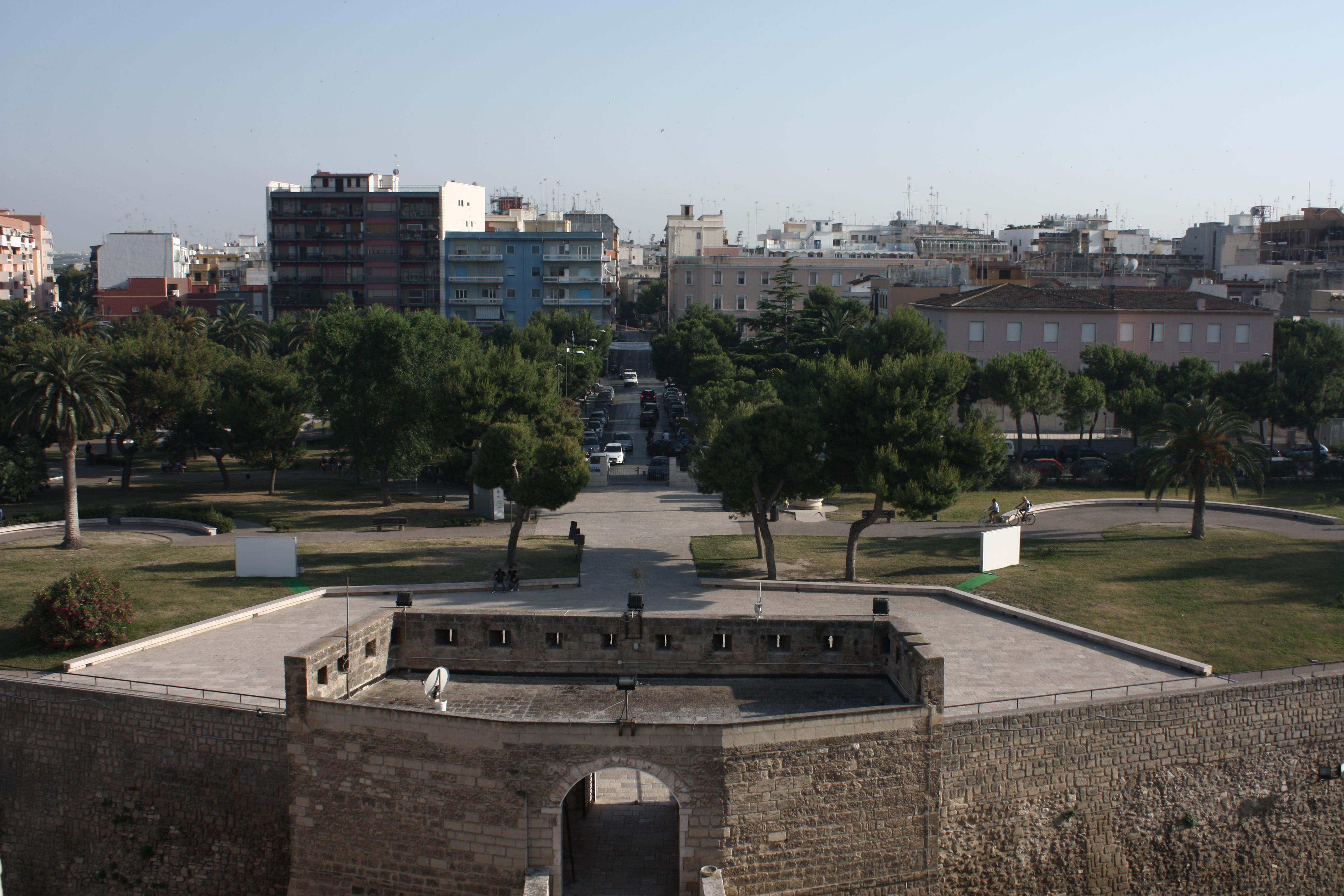 Vista verso sud del rivellino e dei giardini del castello di Barletta dal terrazzo del castello.